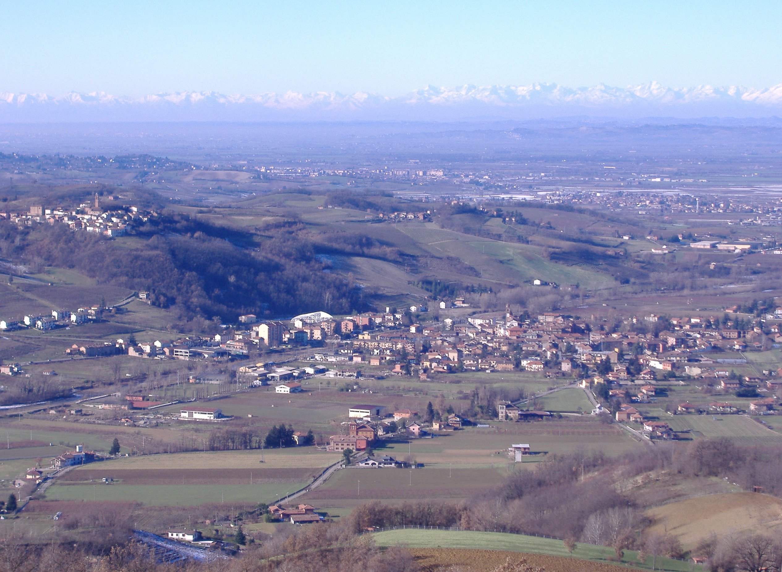 Vilnius, panoramica di Volpedo